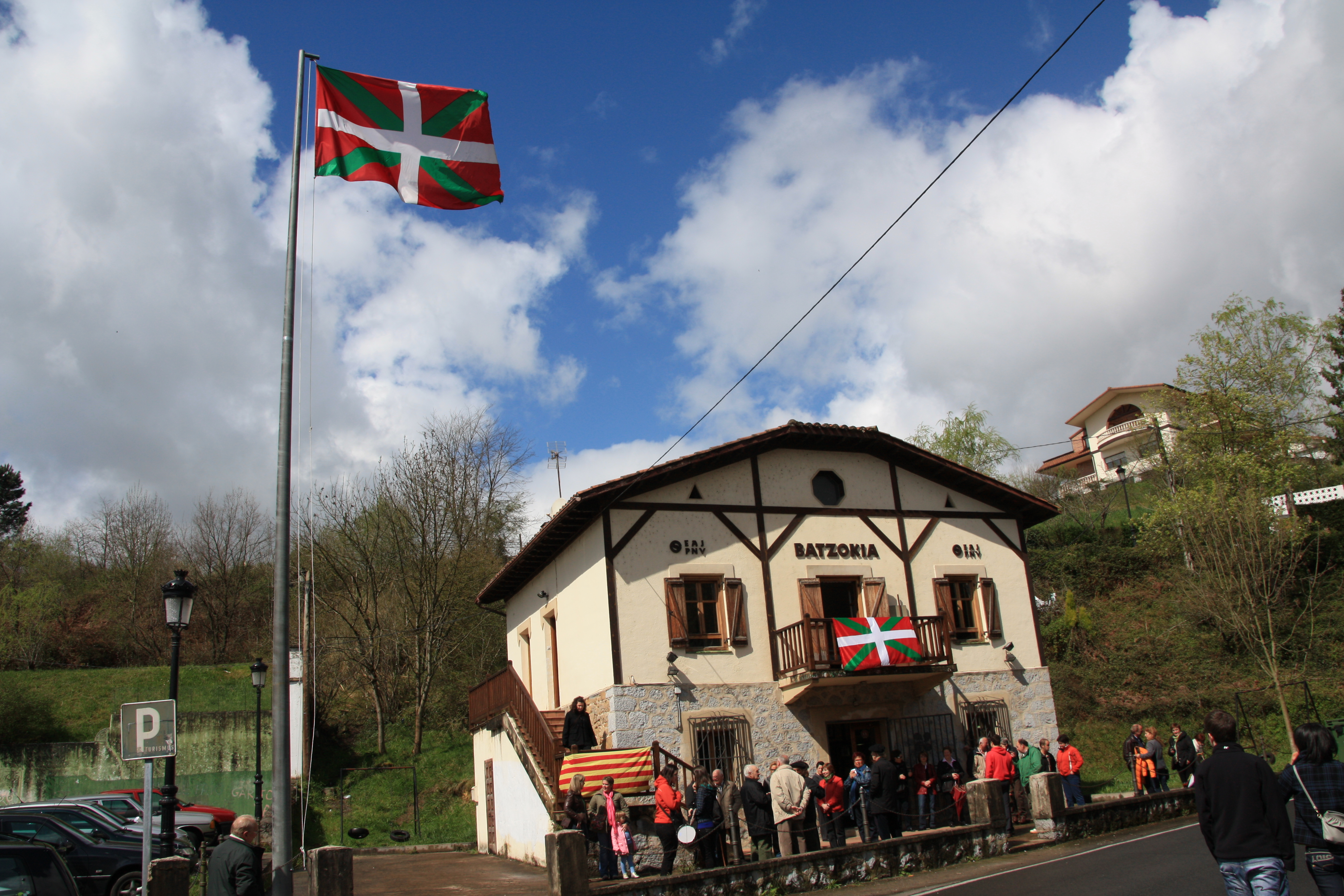 Karrantzako Ambasaguas auzoko_batzokia, 2010eko Aberri Egunean.